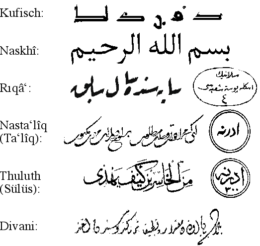 Arabische Schrifttypen zusammengestellt von A. Birken